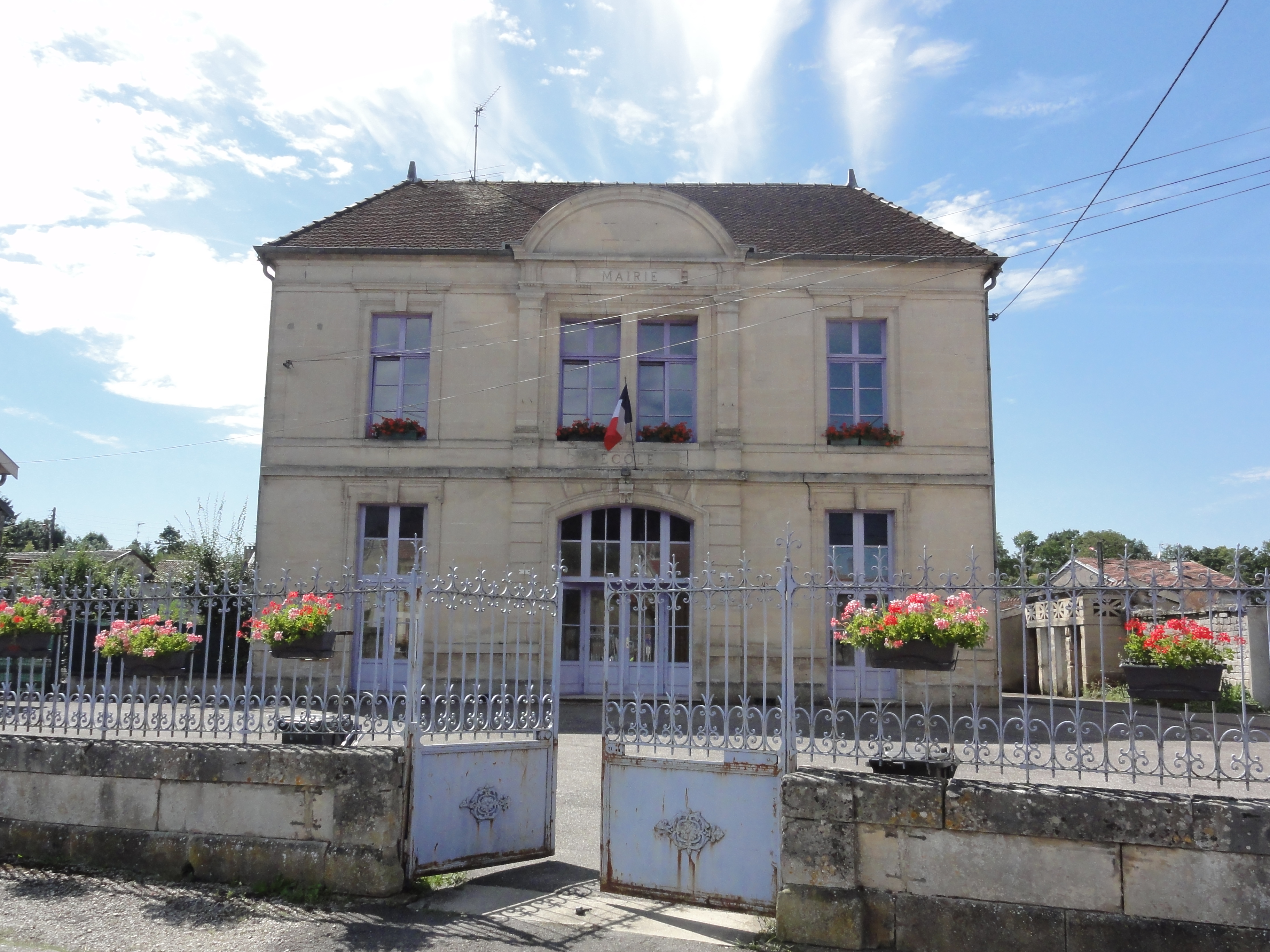 Morley (Meuse) mairie-école